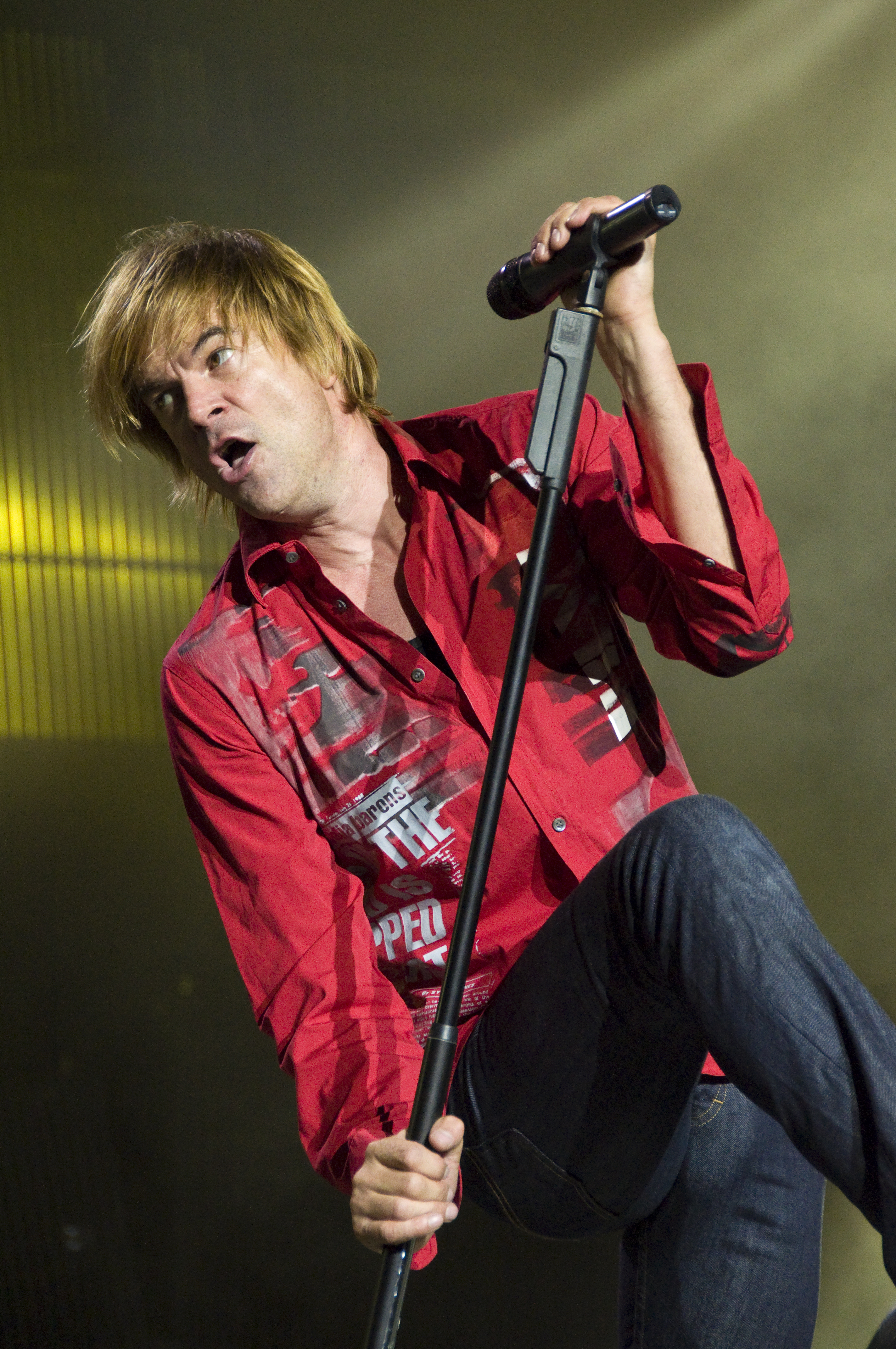 Die Toten Hosen (Jonschwil, 22. August 2009), Die Bühne betraten die Toten Hosen kurz nach 21 Uhr. Die Punk-Veteranen spielten ihre grossen Hits, darunter natürlich «Alles aus Liebe», «Hier kommt Alex» und «Paradies». Feierabend machten die Düsseldorfer nach rund zwei Stunden. Das Publikum war glücklich.